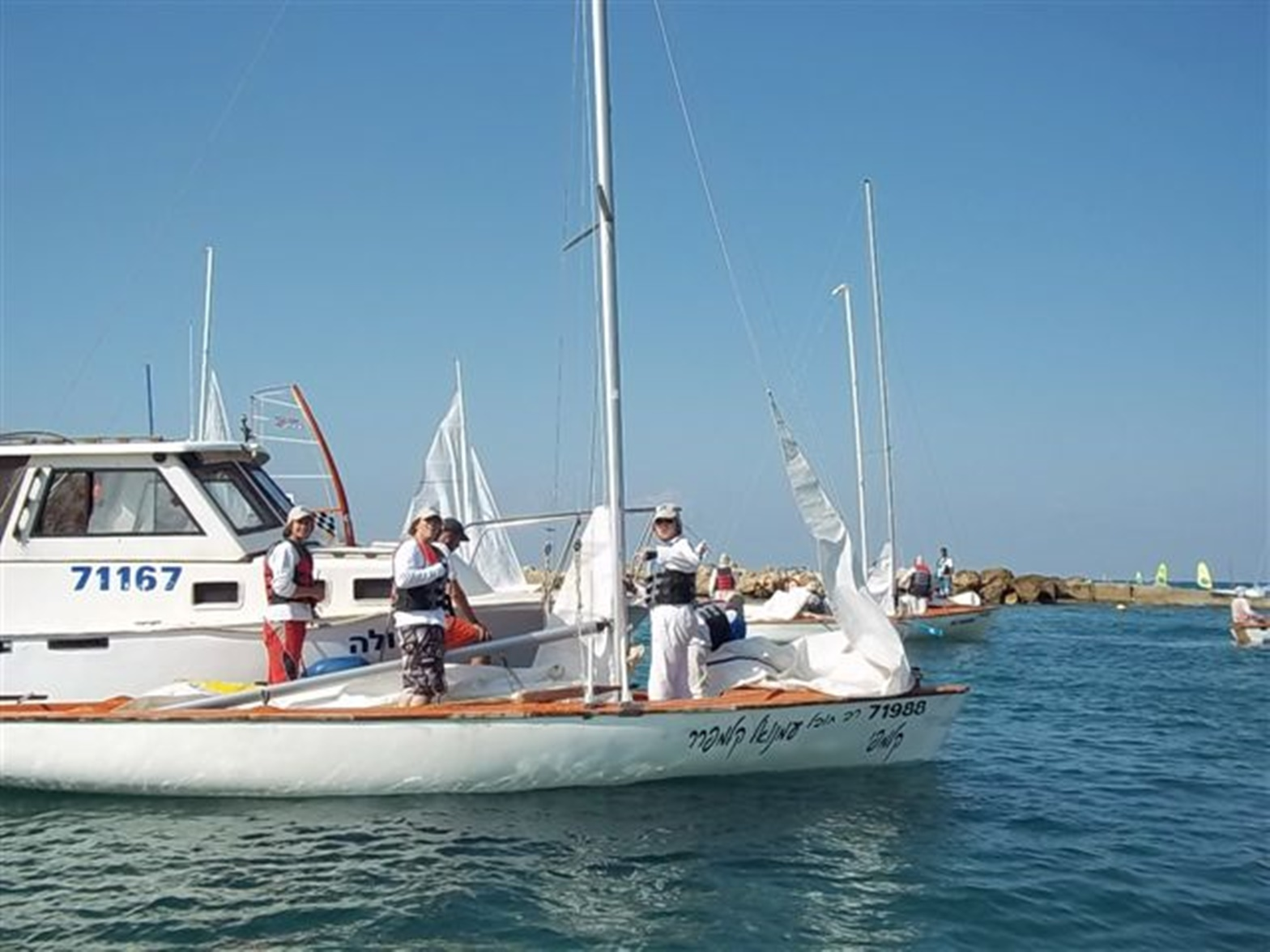 סירת המפרש קלמפי על שם המורה רב חובל עמנואל קלמפרר 2006